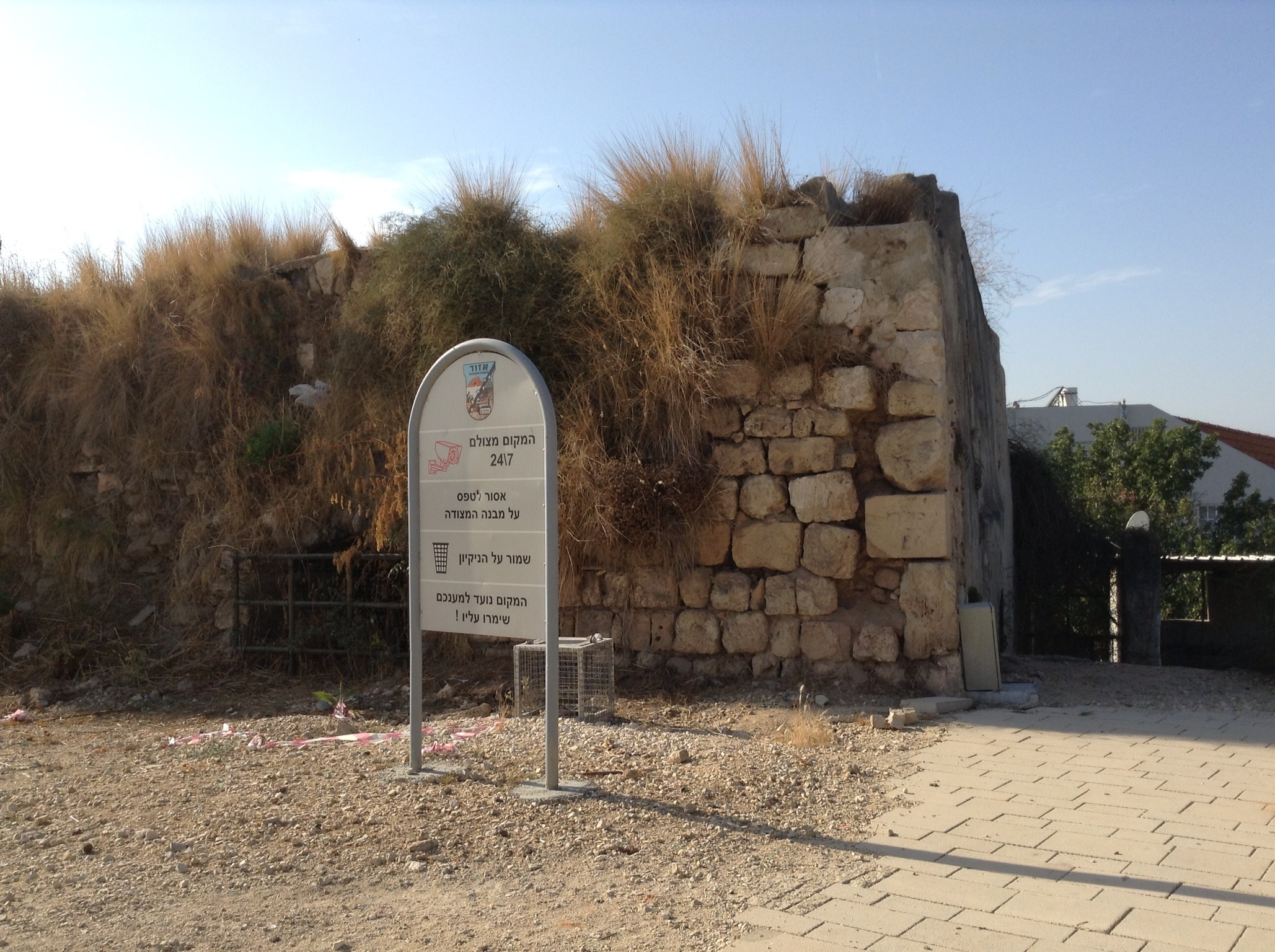 שאטו דה פלאן צפון - Chateau de Plain north